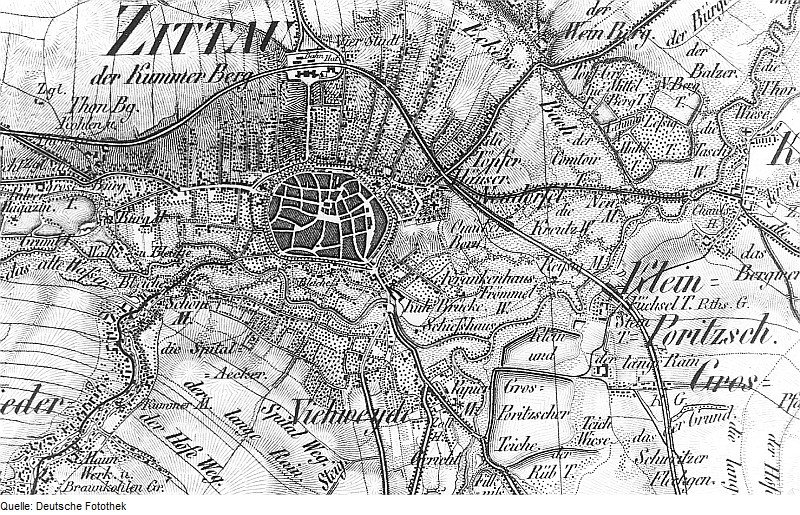 Original image description from the Deutsche Fotothek Zittau. Oberreit, Sect. Zittau, 1844/46